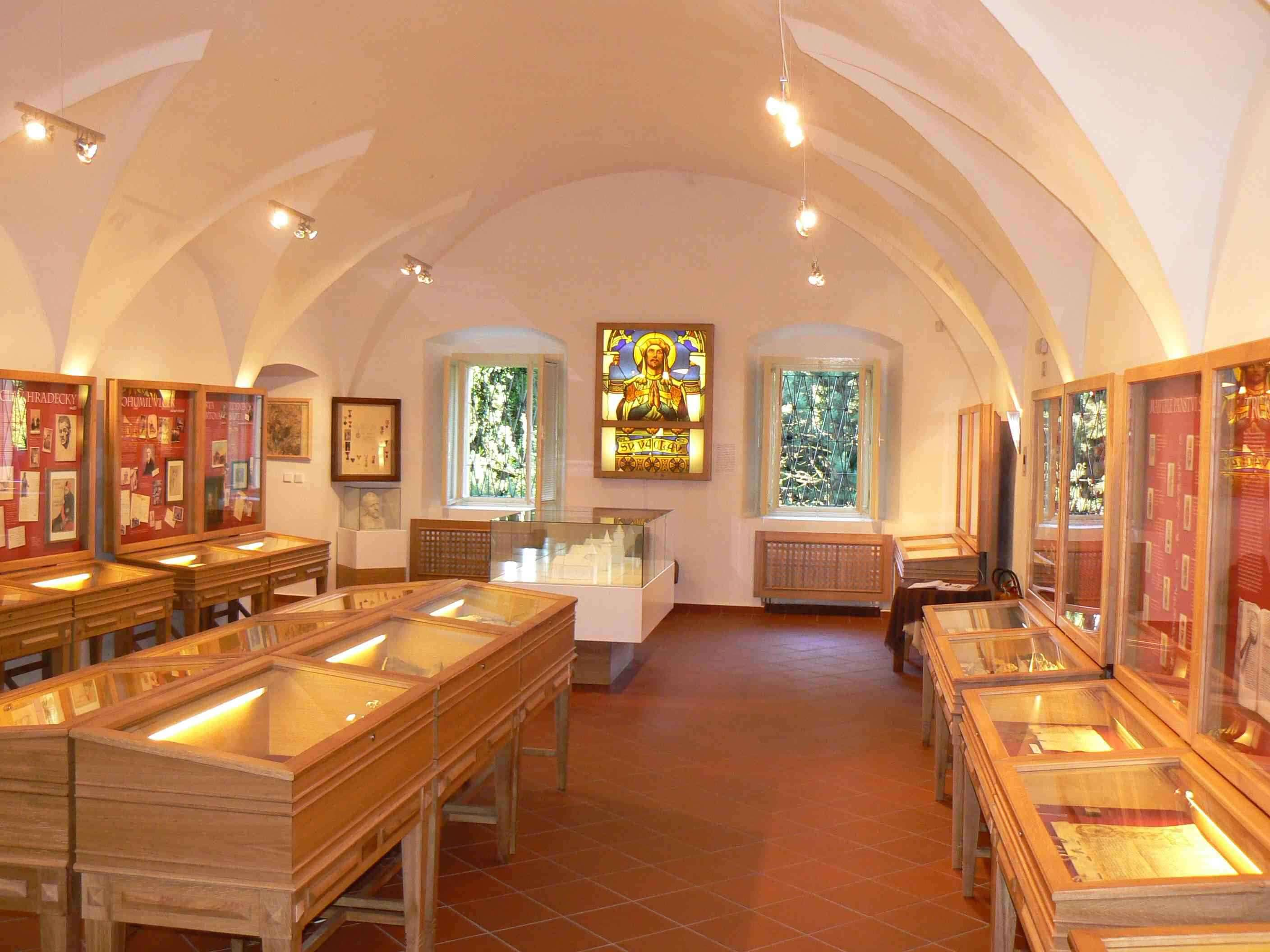 Interiér muzea ve Světlé nad Sázavou